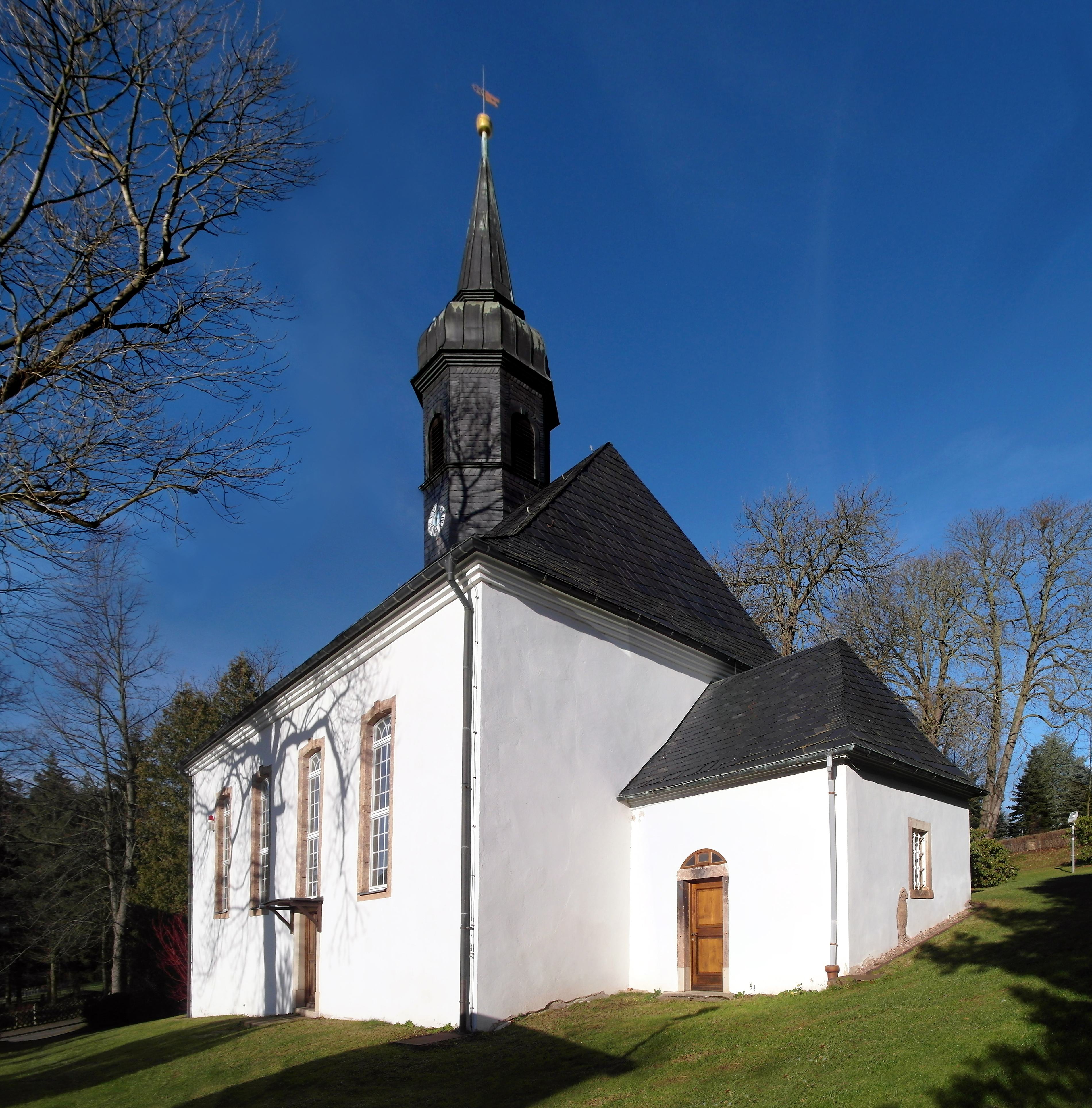 13.12.2017 09385 Ursprung (Lugau): Evangelische Dorfkirche Ursprung. (GMP: 50.779497,12.774990), bei Untere Dorfstraße 2. Nach dem Brand von 1974 erfolgte bis Mitte der 1980er Jahre ein Neubau, der sich am historischen Vorbild orientiert. Sicht von Südosten. [SAM3334+3337+3338.JPG]20171213205MDR.JPG(c)Blobelt